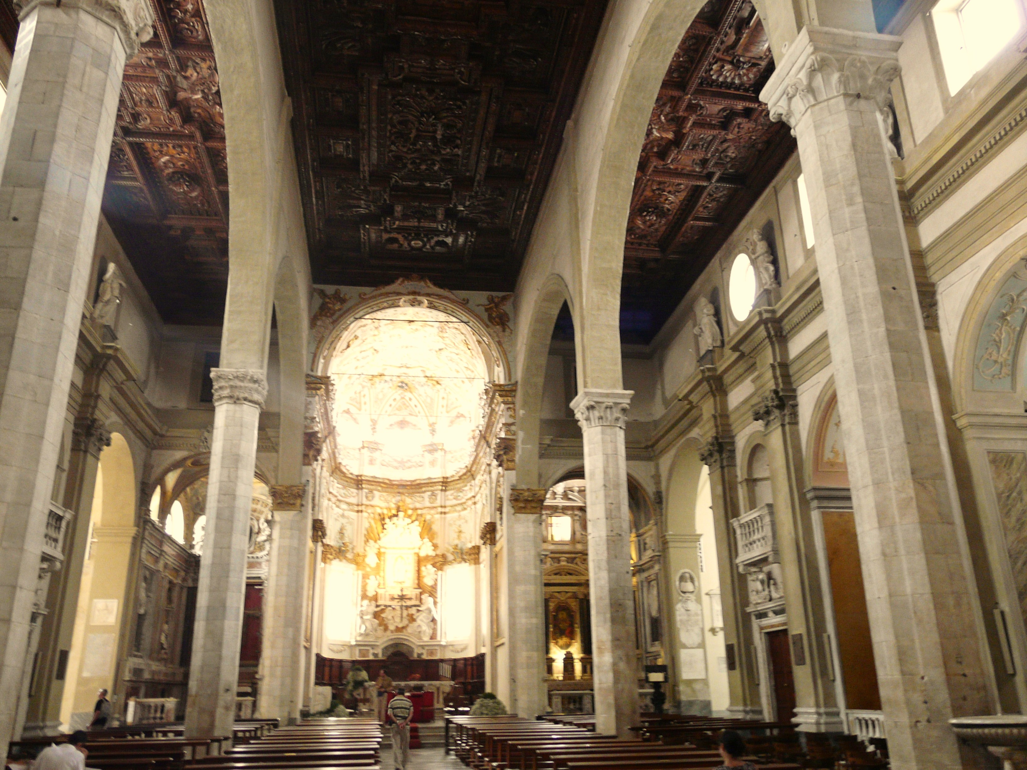 Navata centrale della Cattedrale di Santa Maria Assunta, Sarzana, Liguria, Italia